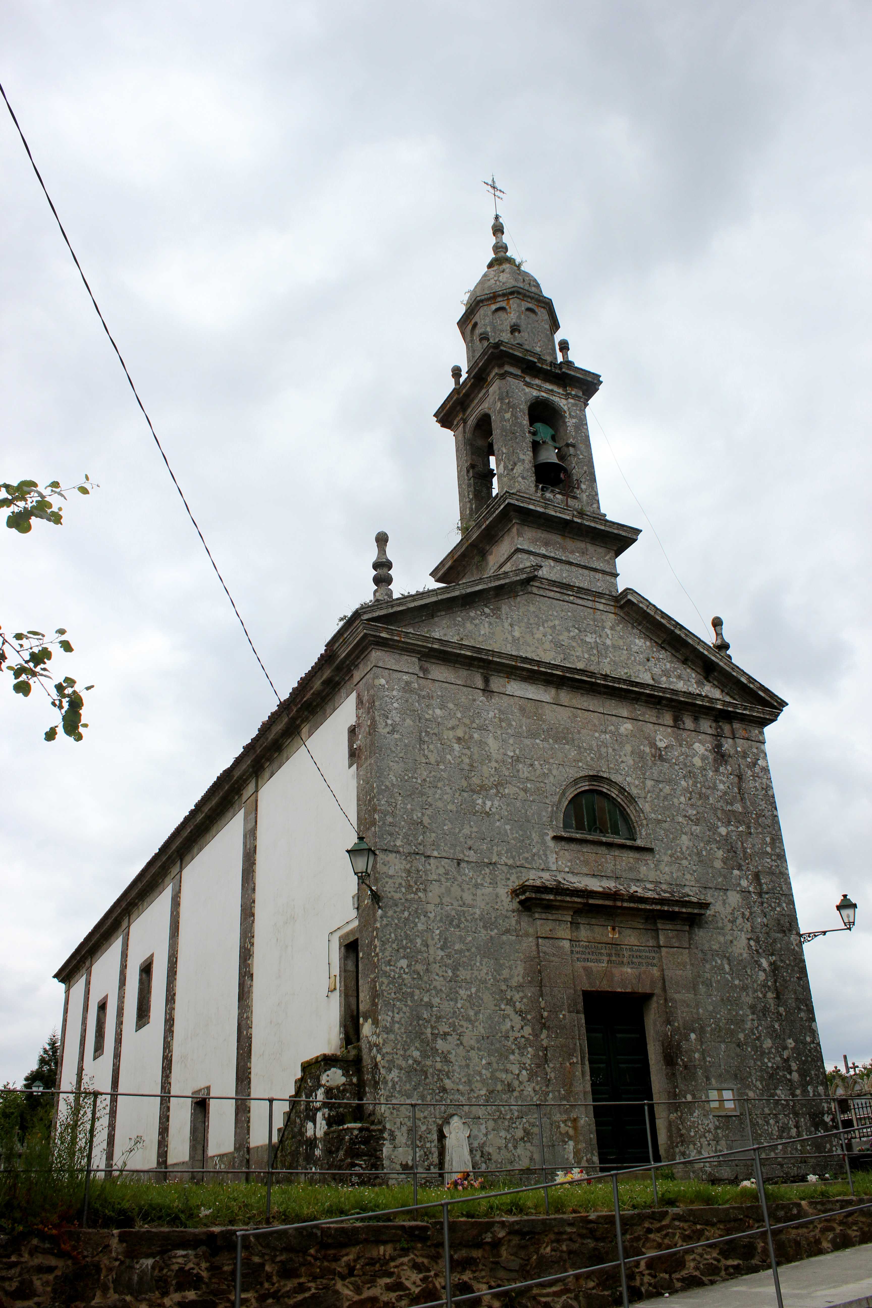 Igrexa de Sabugueira, Santiago de Compostela.